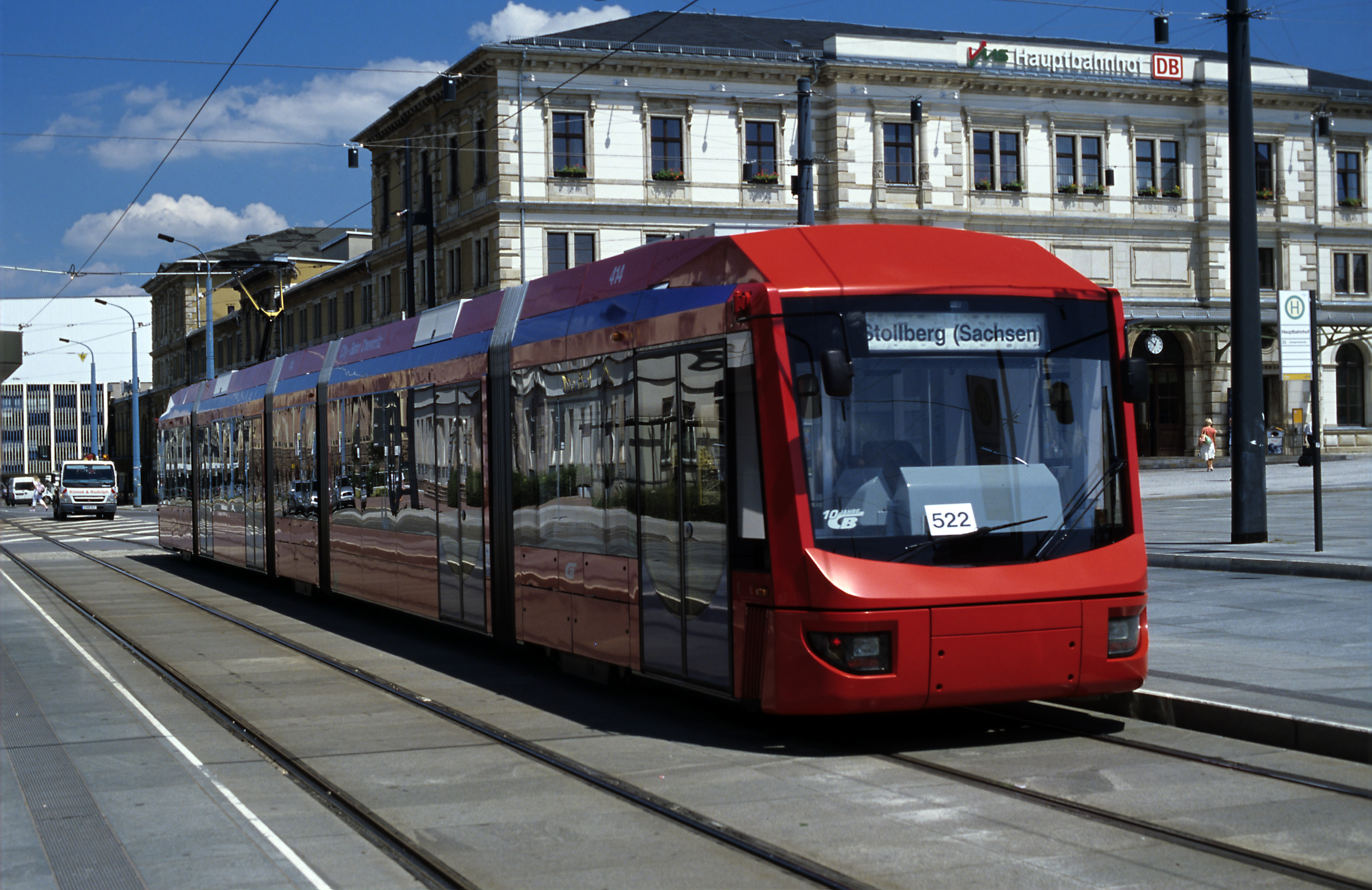 »City-Bahn«-Zug nach Stollberg (Sachs) beim Wendehalt. Noch sind die »Variobahn«-Wagen mit Rollbandzugzielanzeigen und improvisierter Liniennummer ausgerüstet. Die Türanordnung der Ein- und Zweirichtungswagen weicht deutlich ab. Die Zweirichtungswagen haben pro Seite nur vier Türen.